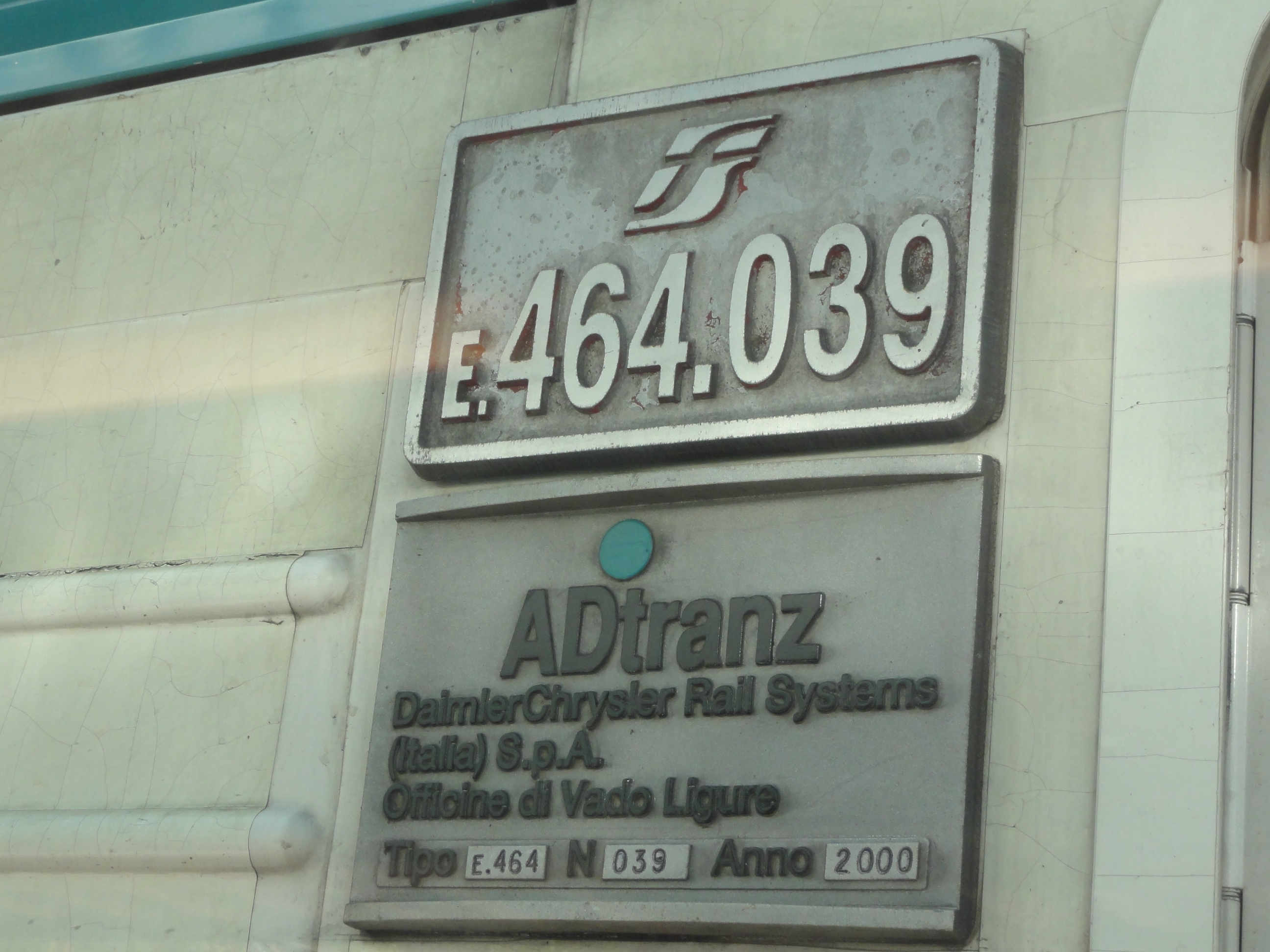 Adtranz-Typenschild (Italien) Info EXIF data regarding date and time may be inaccurate. ADtranz-Schild (FS E.464.039).JPG